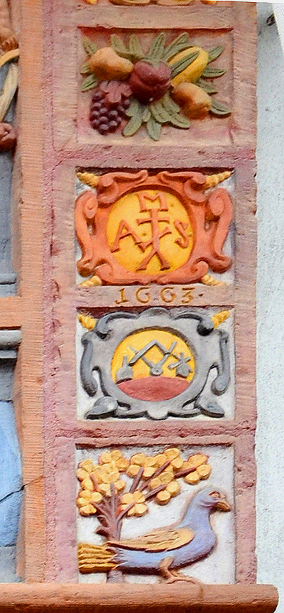 Das Meisterschild des Maurermeisters, Steinhauers und Ratsbaumeisters Adrian Siemerding an dem von ihm ursprünglich neben der Marktkirche bis 1663 erbauten Overlachschen Hauses findet sich seit etwa 1884 am gleichnamigen Gebäude in der Lavesstraße 82 in Hannover. Dieses elektronisch bearbeitete Foto in mäßiger Bildqualität soll zunächst erstmals optisch auf die historische Kostbarkeit aufmerksam machen, und soll später durch ein besseres Foto, gerne auch durch andere Dokumentar-Fotografen, ersetzt werden ...